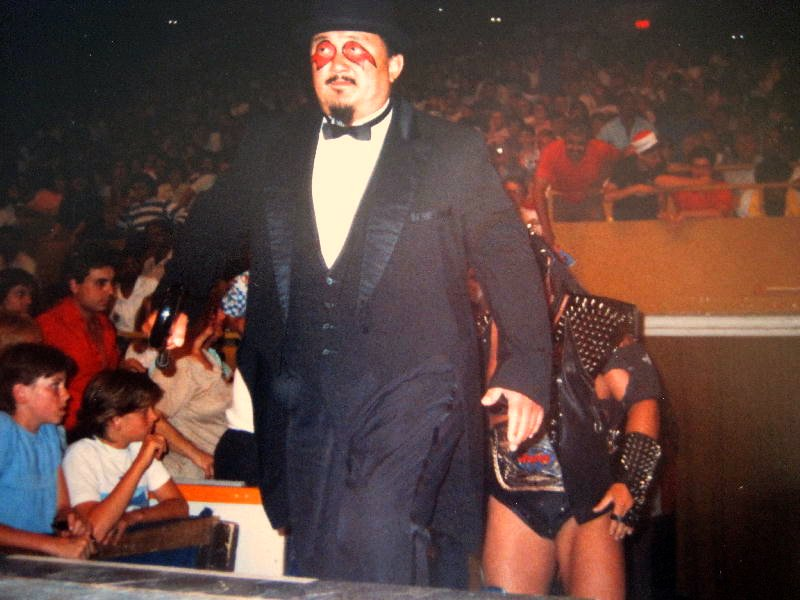 Henry Fujiwara as Mr Fuji, managing Demolition